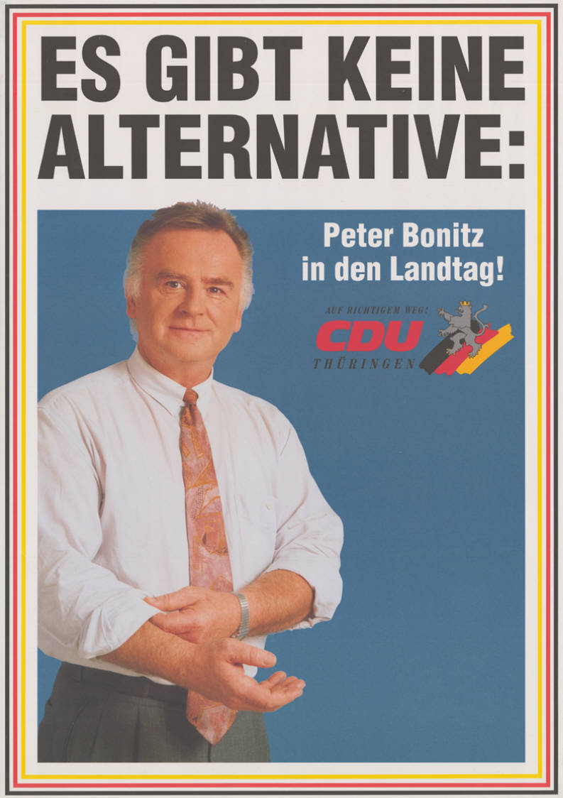 Es gibt keine Alternative: Peter Bonitz in den Landtag! Auf richtigem Weg! CDU Thüringen Abbildung: Foto - Peter Bonitz krempelt die Hemdsärmel hoch - Thüringer Löwe - Nationalfarben Plakatart: Kandidaten-/Personenplakat mit Porträt Auftraggeber: CDU LV Thüringen Objekt-Signatur: 10-037 : 112 Bestand: Landtagswahlplakate Thüringen (10-037) GliederungBestand10-18: Landtagswahlplakate Thüringen (10-037) » CDU Lizenz: KAS/ACDP 10-037 : 112 CC-BY-SA 3.0 DE